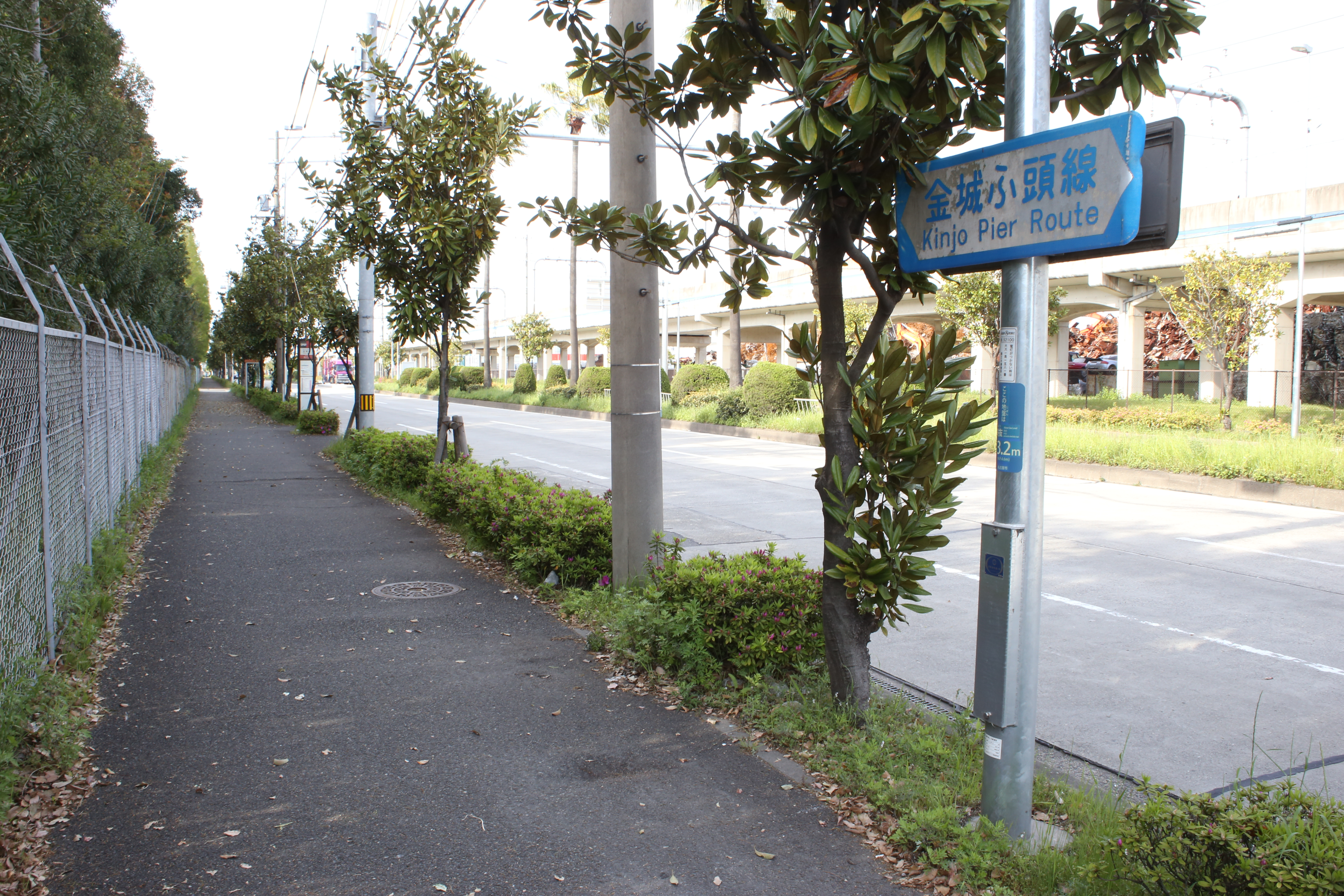 名古屋市港区空見町の名古屋市道金城埠頭線